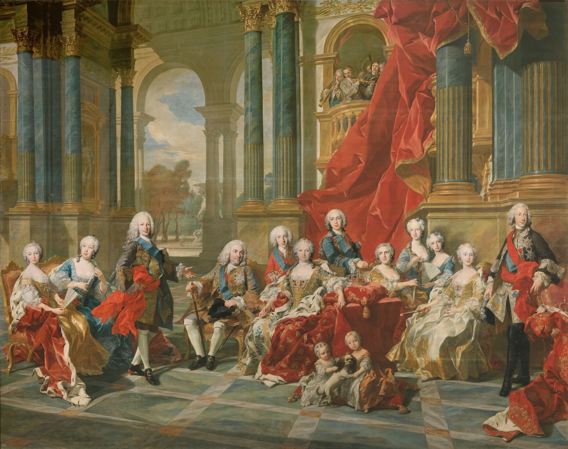 La obra muestra a los miembros de la familia del rey Felipe V de España (1683-1746), que fue nieto del rey Luis XIV de Francia y el primer monarca de la Casa de Borbón en España.